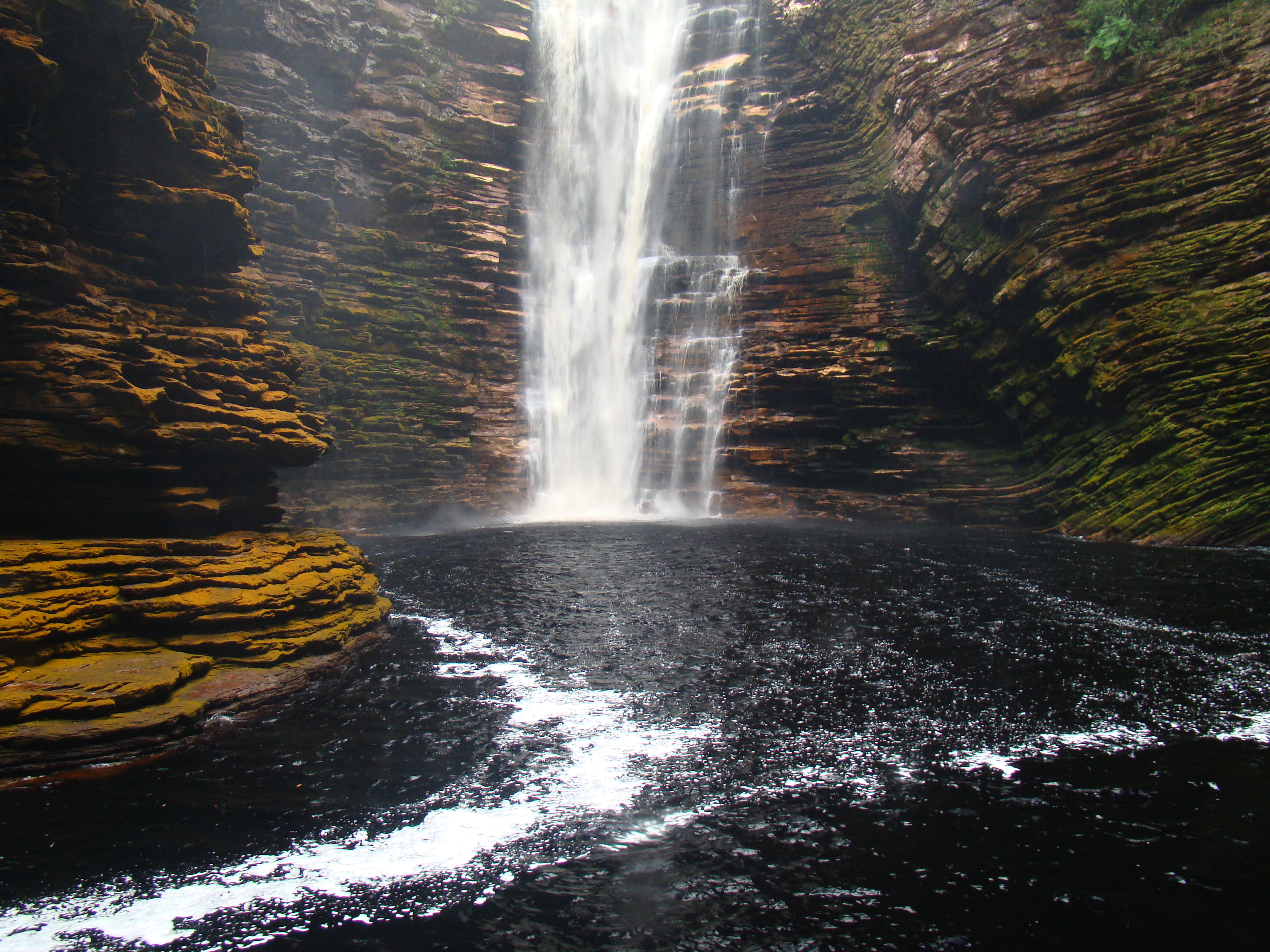 Cachoeira do Buracão - Chapada Diamantina - Bahia - Brasil Autor = Adelano Lázaro